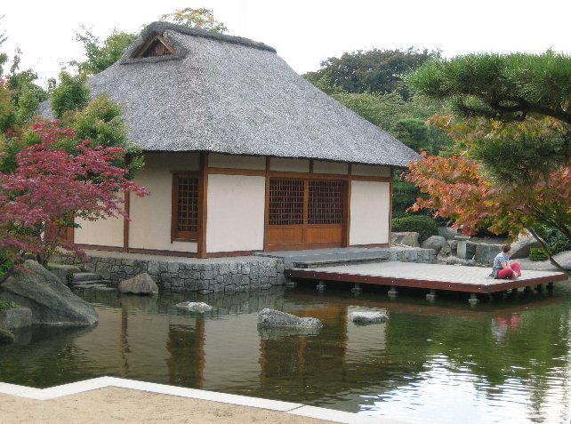 Haus im japanischen Garten in Hamburg (Originalversion). Lizenz: GNU-FDL. Bildquelle: mit der Digitalkamer Canon Ixus 50 aufgenommen. This is a photograph of an architectural monument.